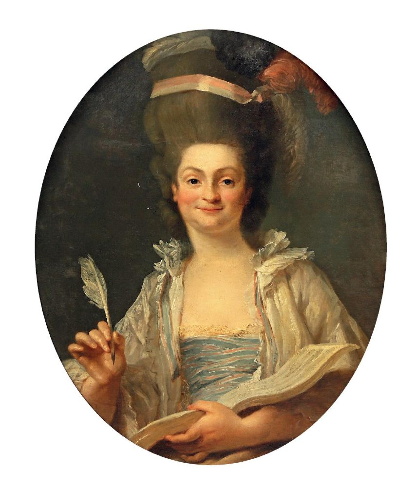 Jean-Baptiste-Claude Robin, Portrait de Marie-Emmanuelle Bayon, épouse de l'architecte Victor Louis, exposé au Salon de l'Académie royale de peinture et de sculpture de 1777 (numéro 167), peinture à l'huile sur toile, 74 x 60 cm, Paris, collection particulière.